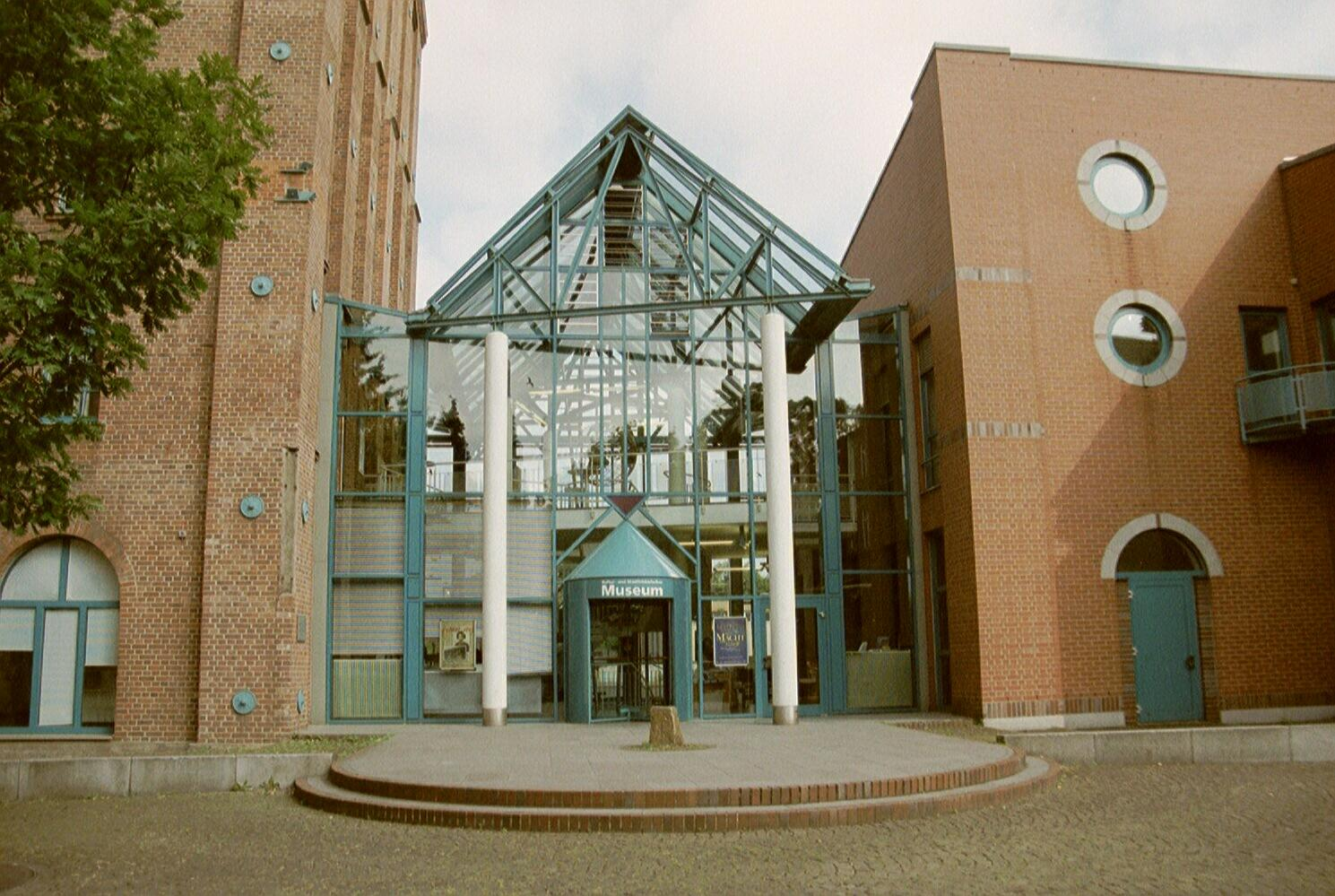 Kultur- und Stadthistorisches Museum